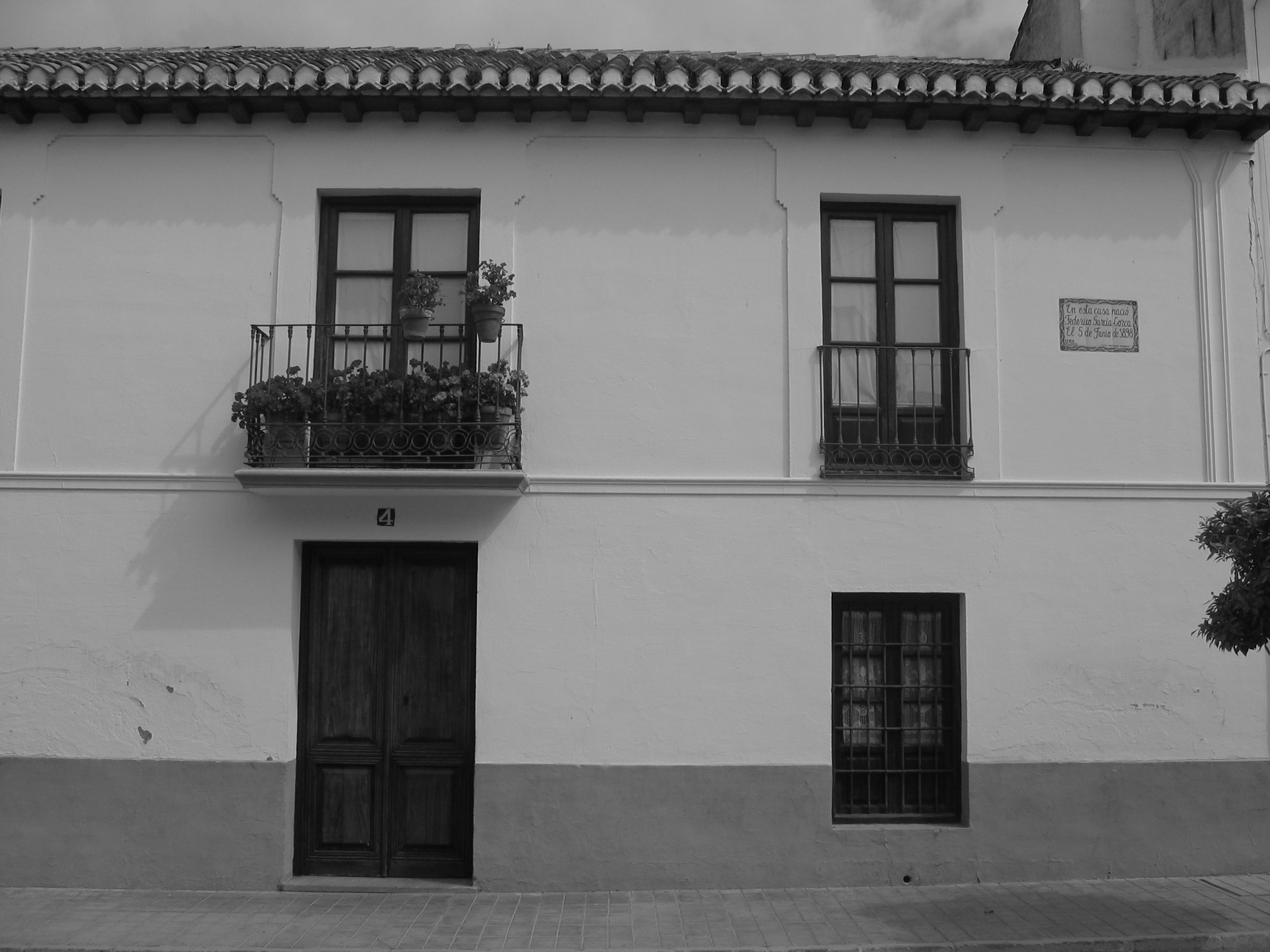 Residencia de Federico Garcia Lorca, en Fuente Vaqueros